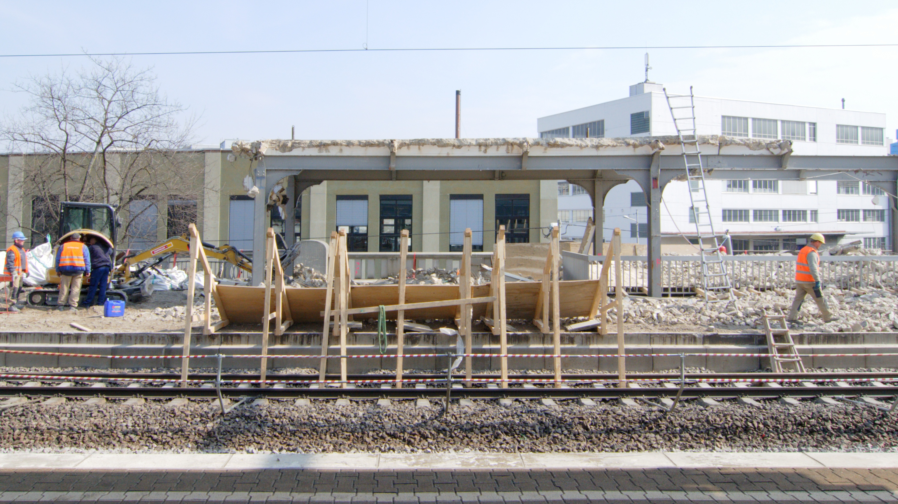 Abriss der Überdachung von Bahnsteig 3 am Feuerbacher Bahnhof im Zuge von Stuttgart 21